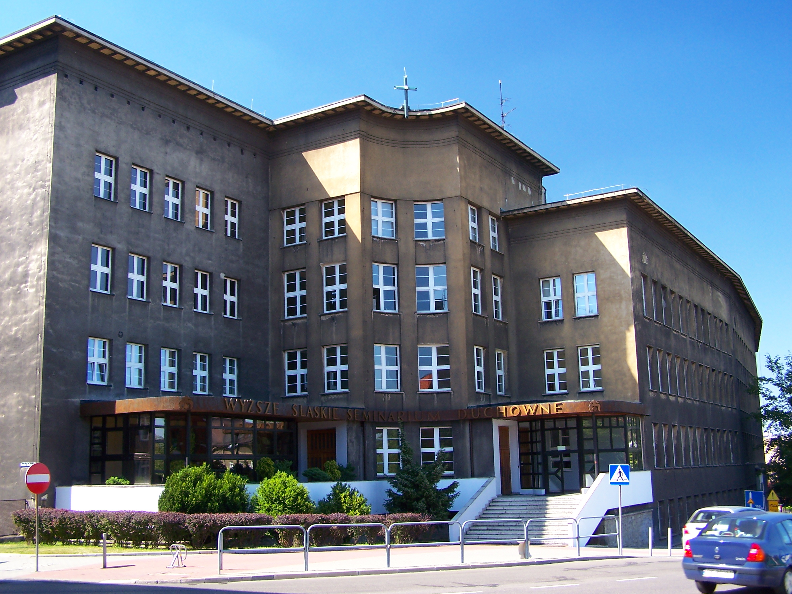 Wyższe Śląskie Seminarium Duchowne w Katowicach.